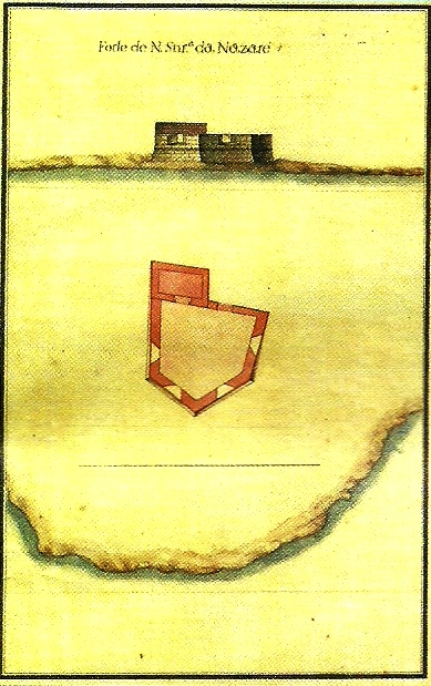 "Forte de N. Sra. da Nazaré", s/d, autor desconhecido, Arquivo Histórico Militar, Lisboa. in MARTINS, José Salgado, "Património Edificado da Ilha Terceira: o Passado e o Presente". Separata da "Atlântida", vol. LII, 2007. p. 41. Também integrante da "Colecção de Plantas e Alçados de 32 Fortalezas dos Açores, por Joze Rodrigo d'Almeida em 1830", José Rodrigo de Almeida, 1830 (c.) GEAEM (346-1-8A-96), Lisboa, Portugal.